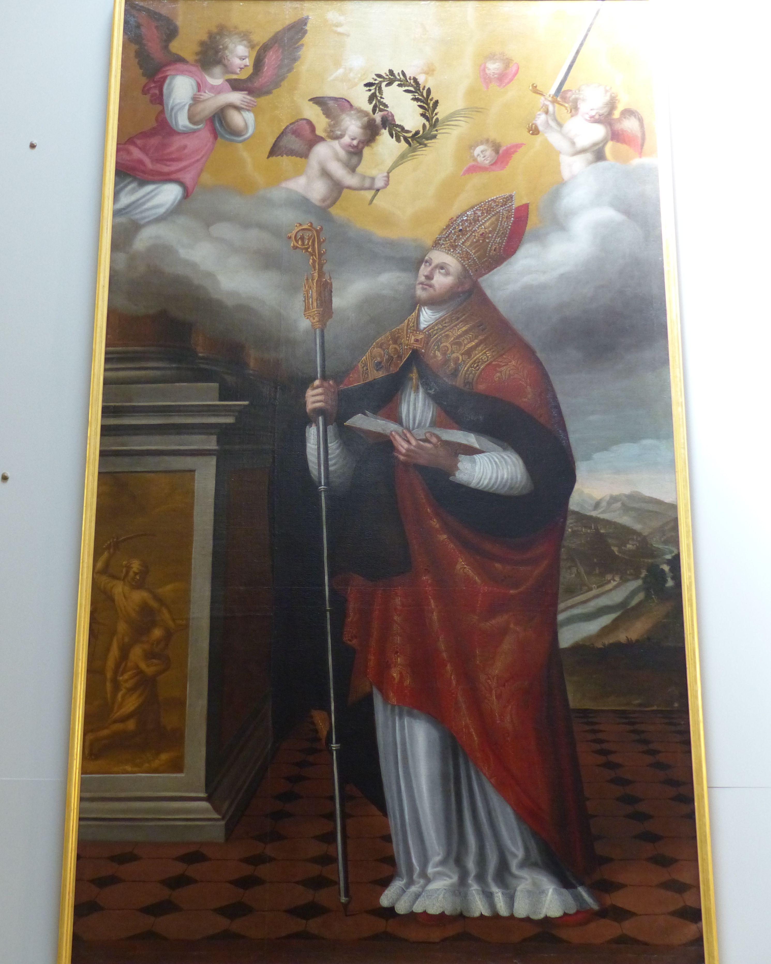 Nice (Alpes-Maritimes, France), cathédrale Ste Réparate, chapelle dite des évêques, ajoutée en 1900 en position d'absidiole méridionale; portrait en pied de Pons de Cimiez, martyrisé dans l'amphithéâtre de Cimiez en 257.